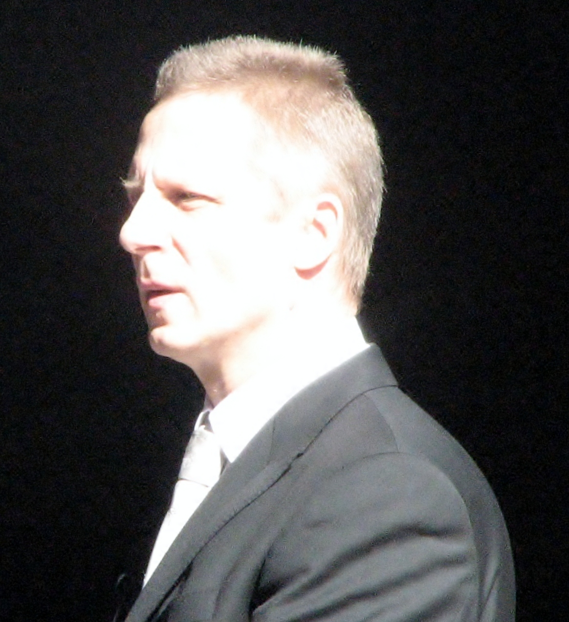 Vello Pähn esinemas Rahvusooper Estonia 107. hooaja avamisel